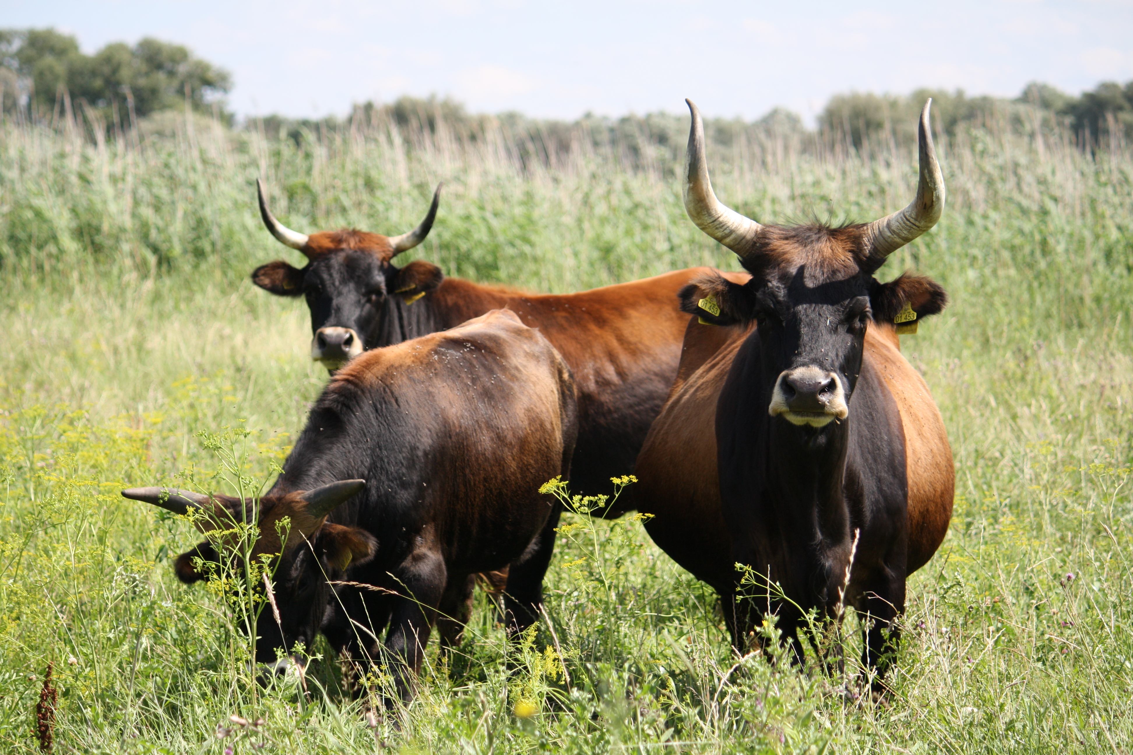 Heckrinder im Nationalpark Unteres Odertal in der Nähe von Stolzenhagen